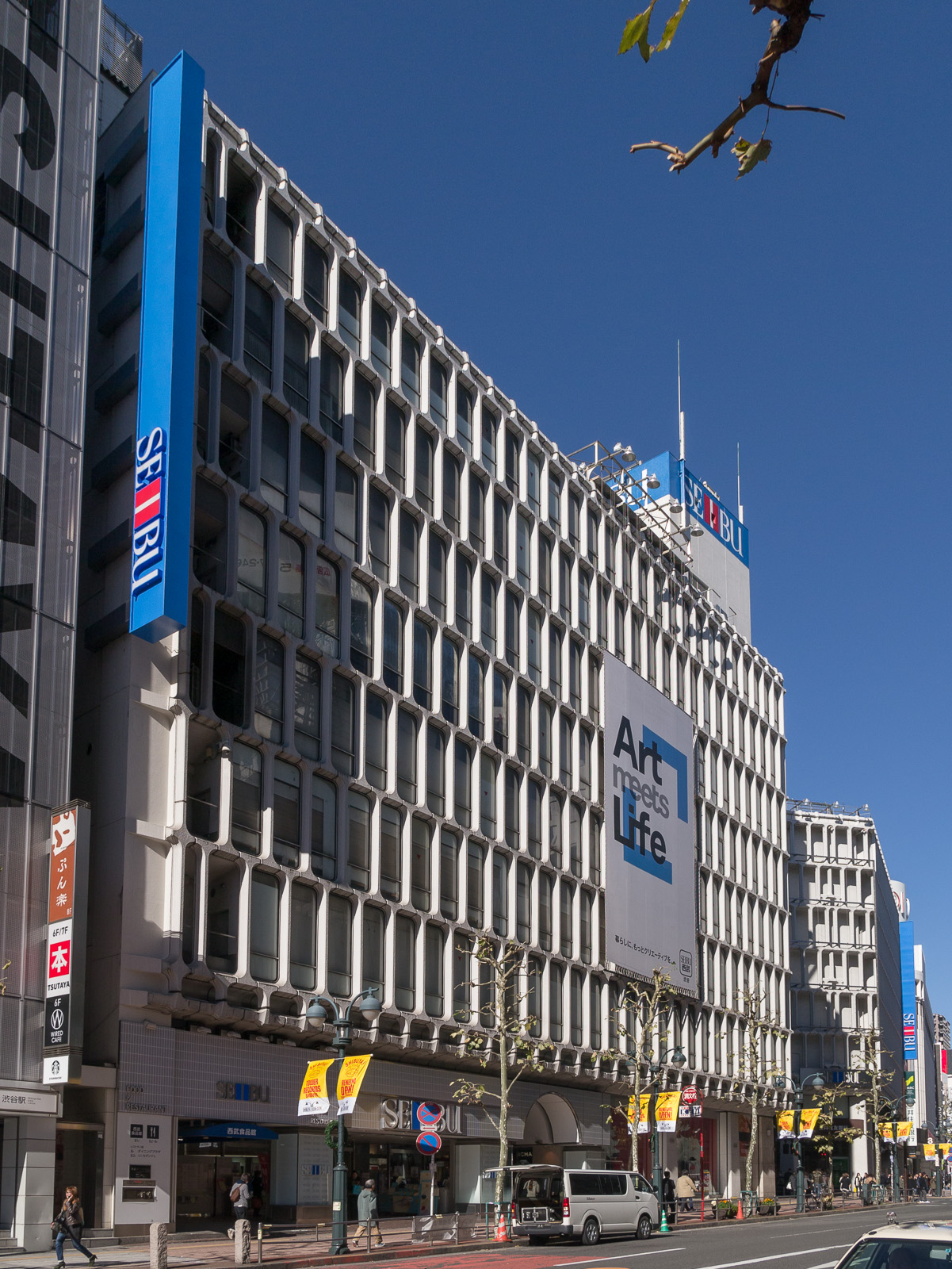 西武百貨店渋谷A館、東京都渋谷区。